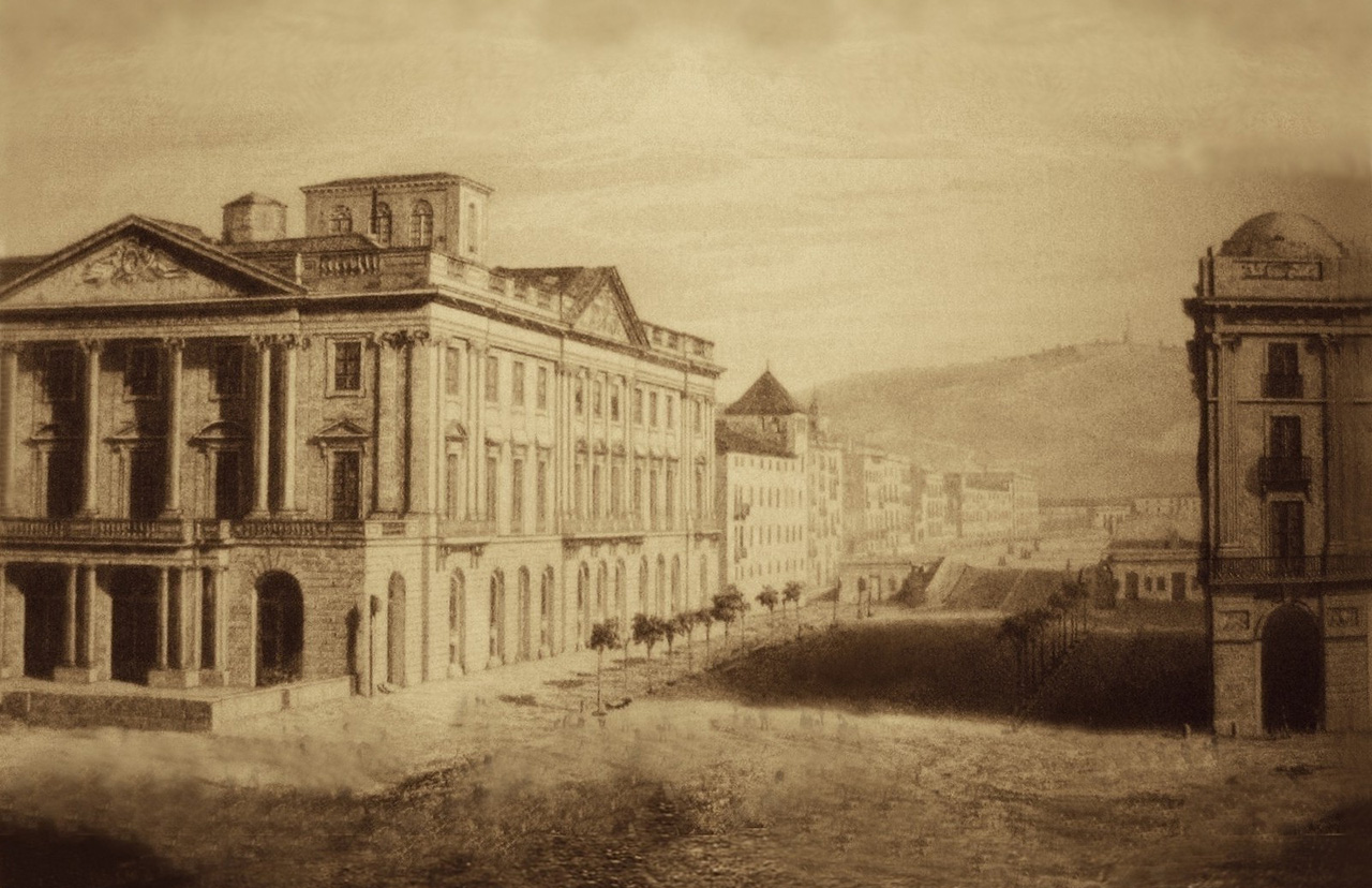 Llotja002